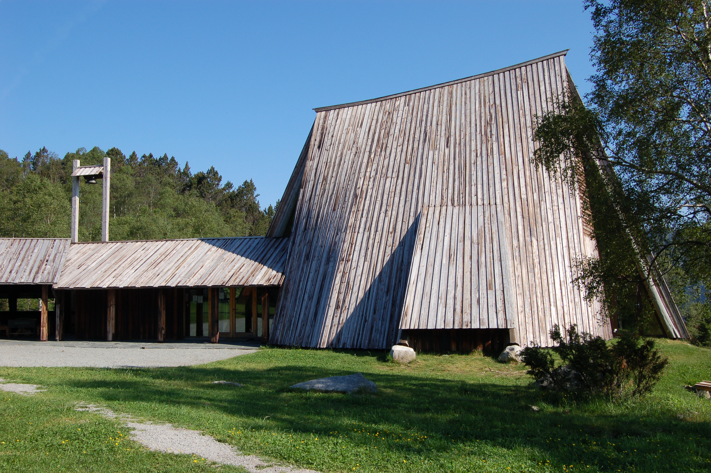 Brekko chapell, Gjesdal, Rogaland, Norway